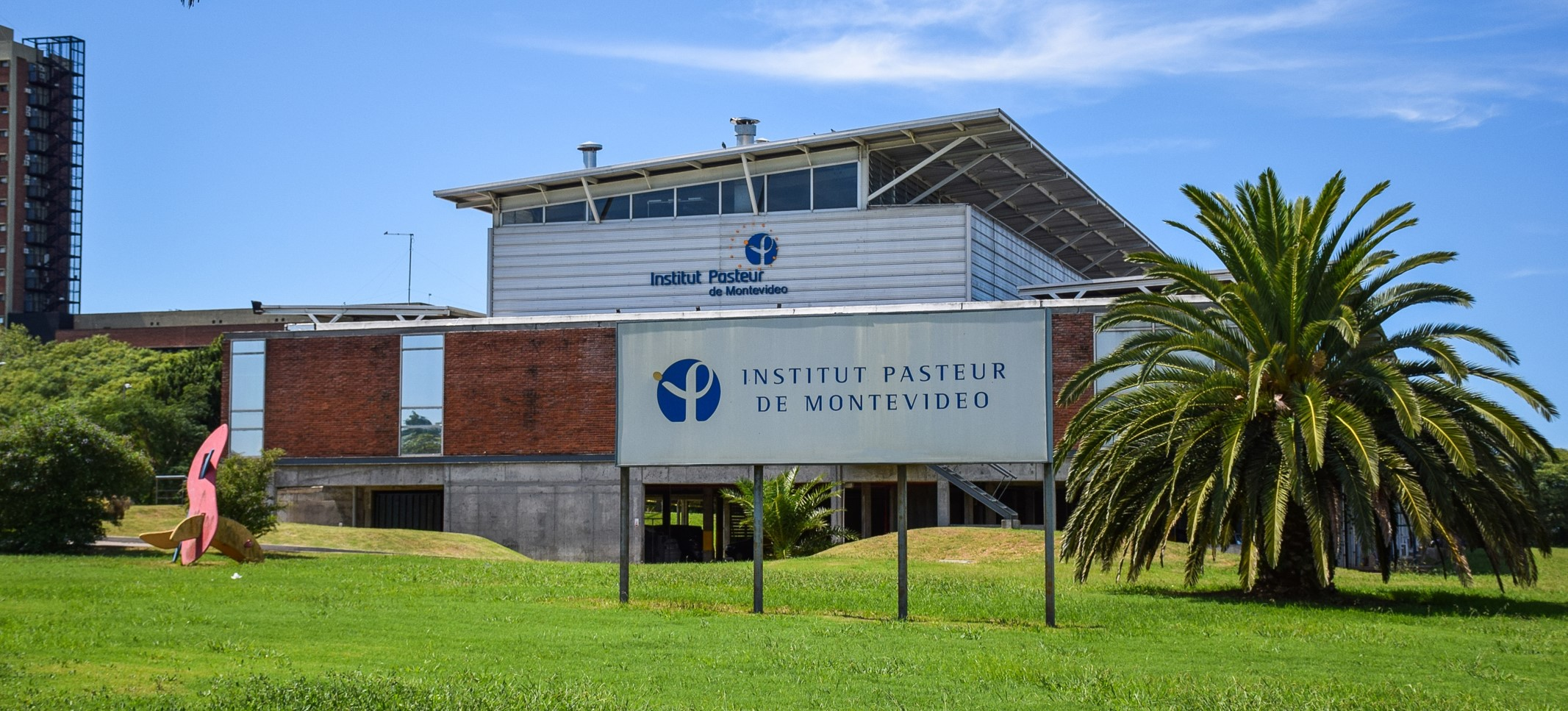 Fachada Principal